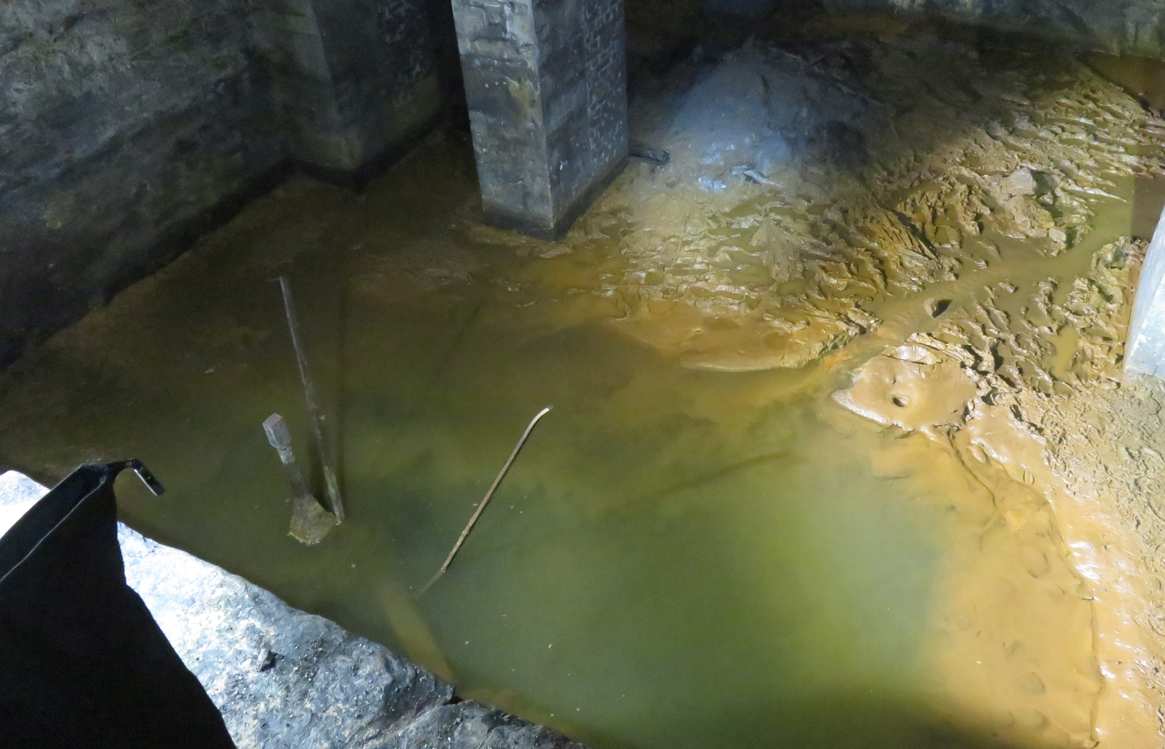 Grube Landeskrone, Wilnsdorf-Wilden, Kreis Siegen-Wittgenstein. Gestänge im Schacht.